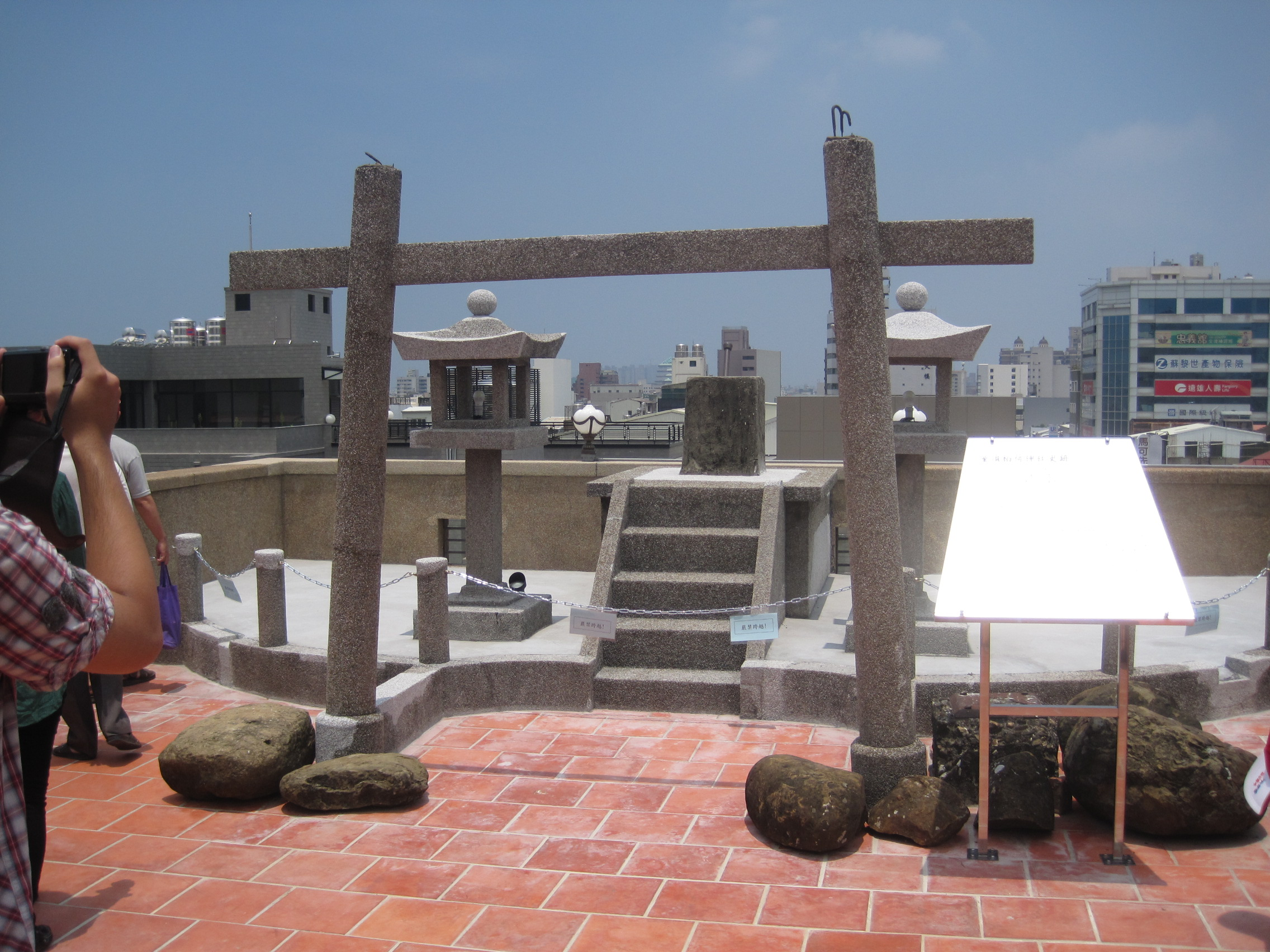 林百貨頂樓神社遺跡